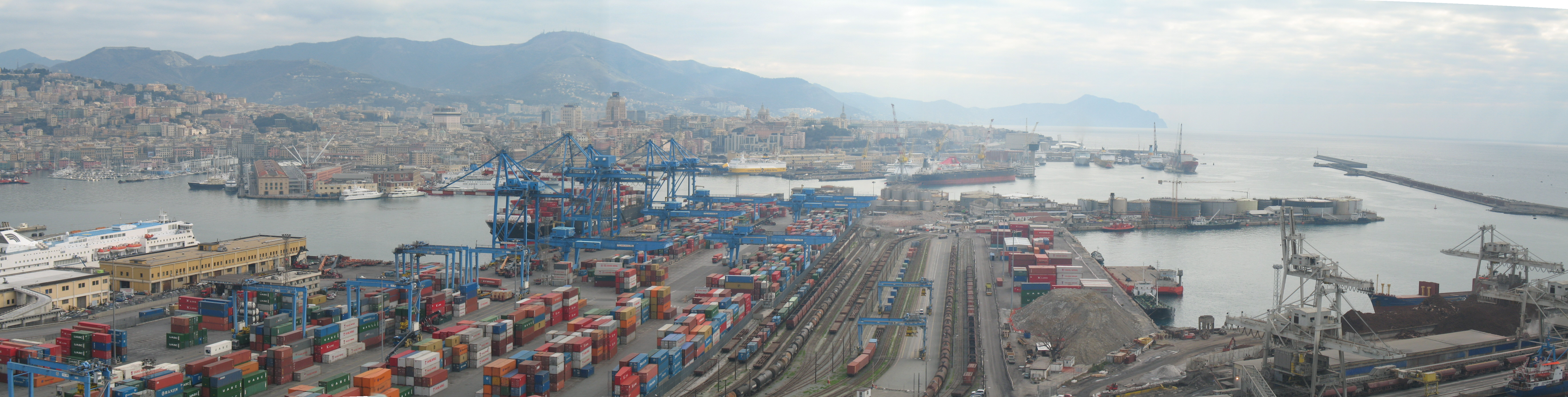 Immagine dal Porto di Genova (terminal, moli, container, calate, ecc.)